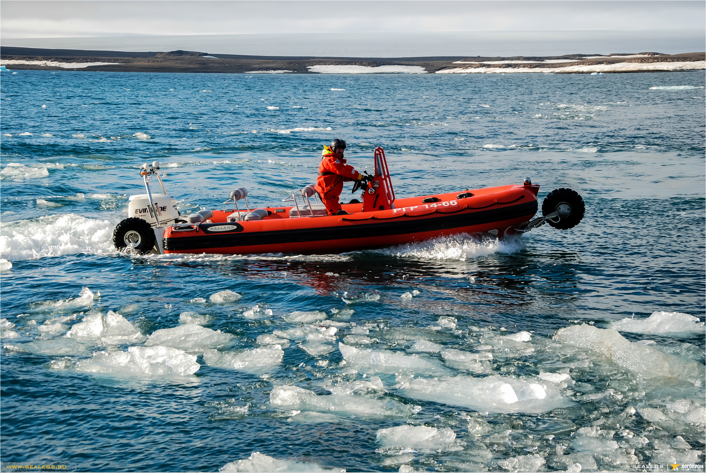 Амфибийный катер Sealegs 7.1 RIB на испытаниях в Арктике, архипелаг Земля Франца-Иосифа. 1913 год